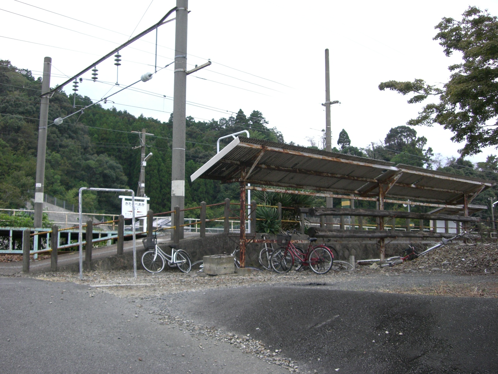 北延岡駅駅舎